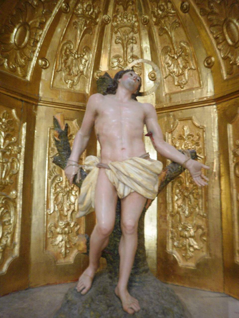 Catedral de Coria (Coria, provincia de Cáceres), Capilla de las Reliquias.